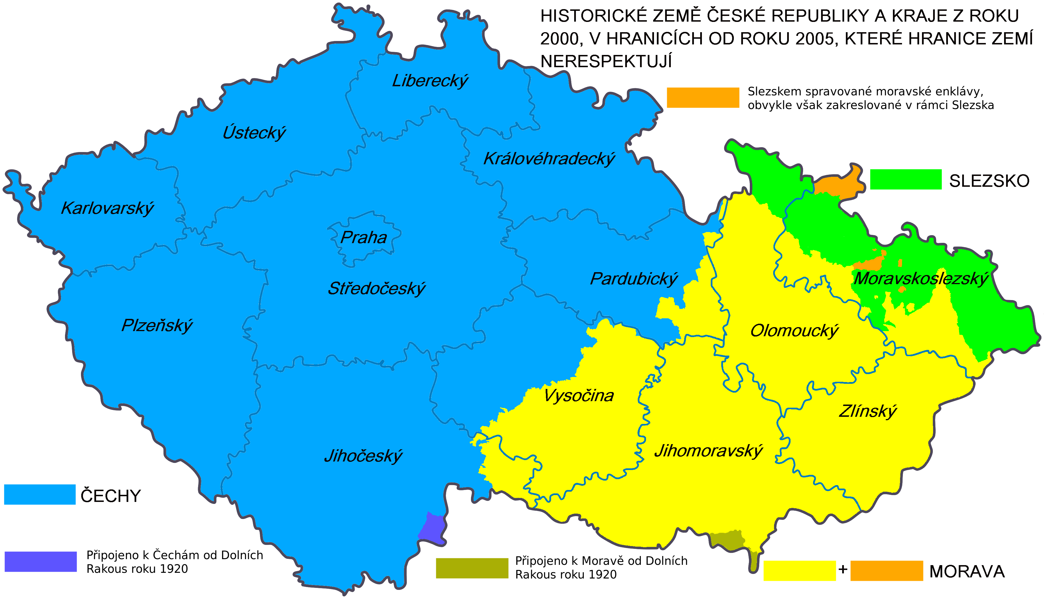 Česká republika a její historické země a současné kraje, které jejich hranice nerespektují